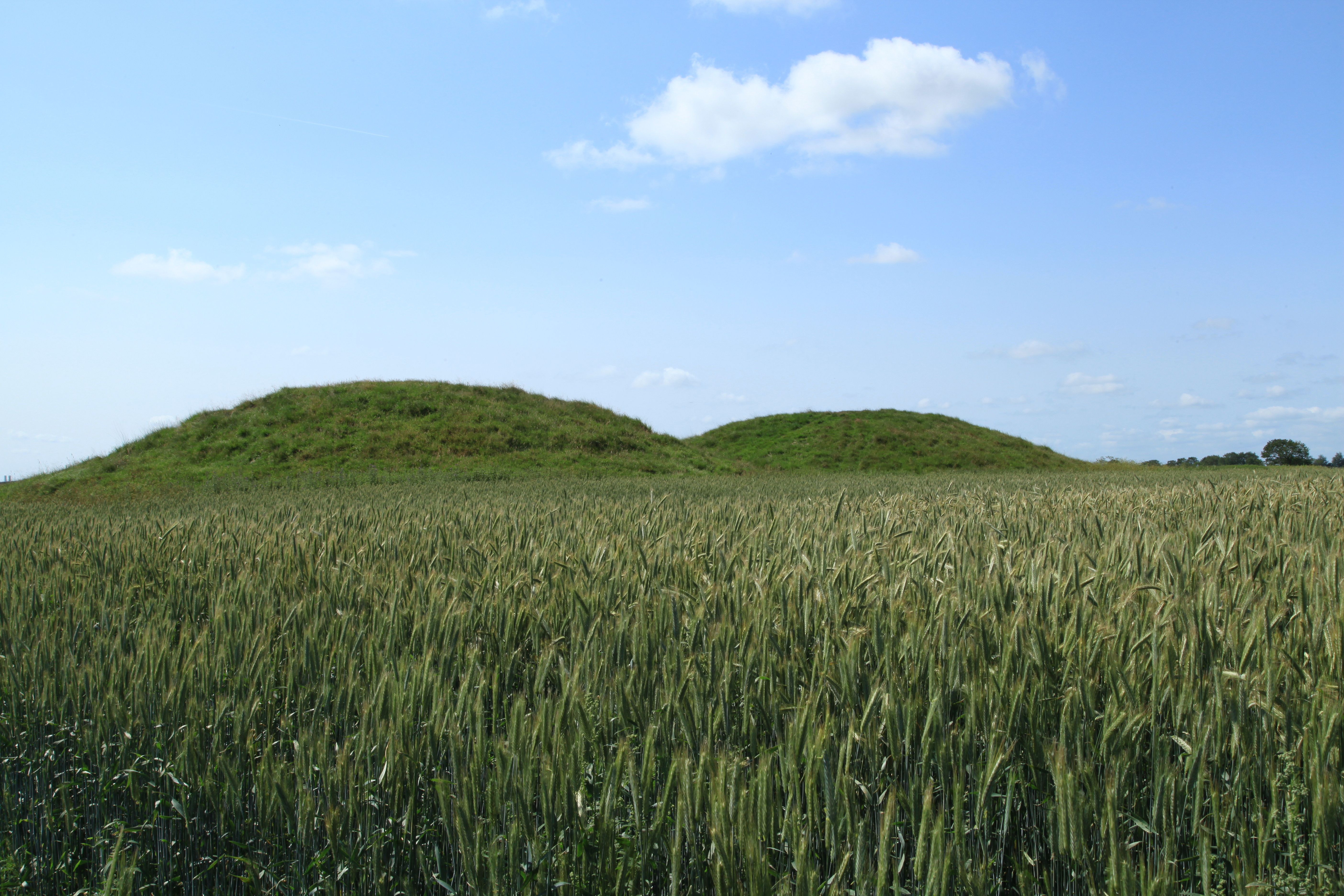 Grabhügel Tweebargen, nahe Kograben und Ochsenweg in Dannewerk